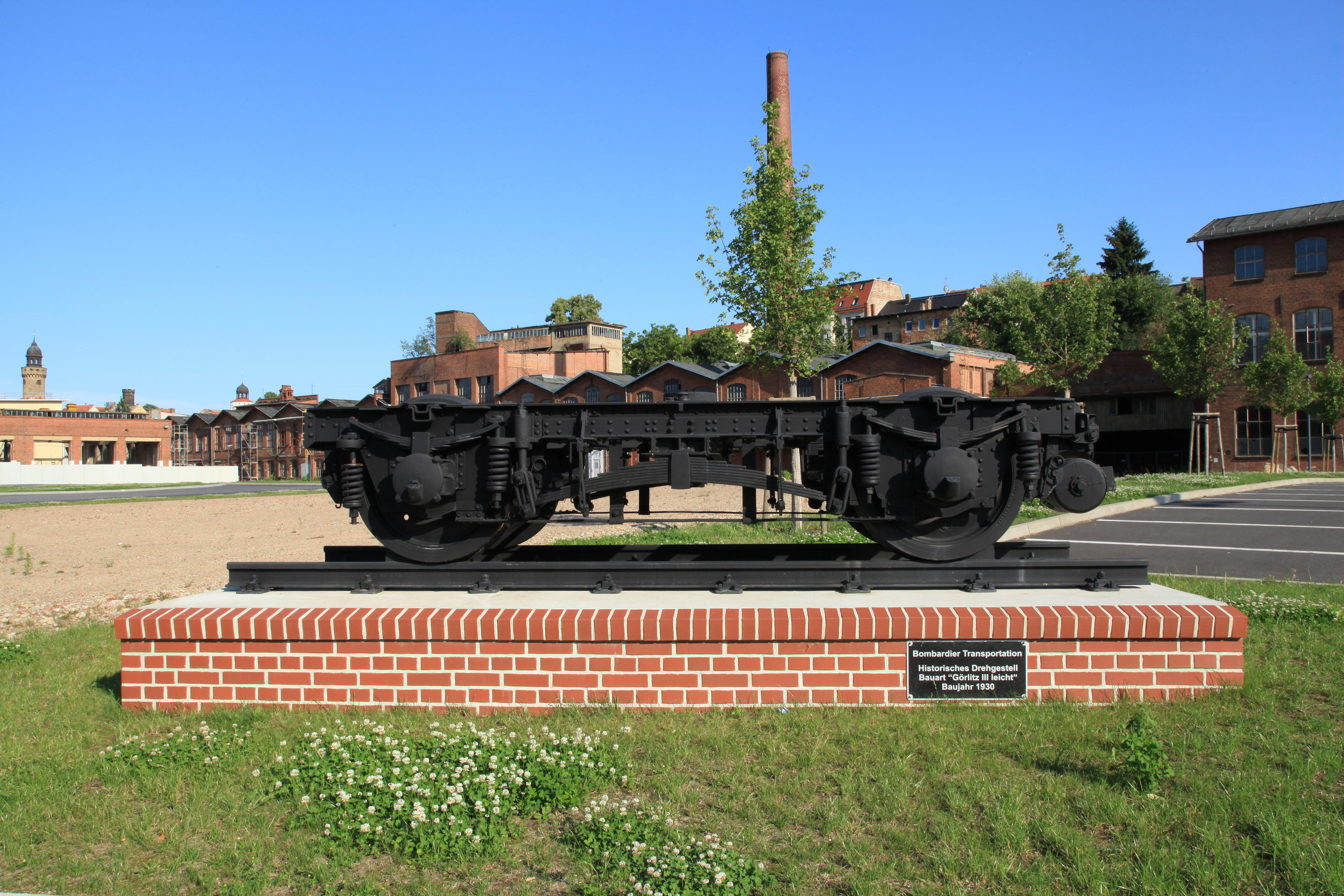 Historisches Drehgestell "Görlitz III leicht", Waggonbau Görlitz Werk I nach dem Teilabriss, Christoph-Lüders-Straße in Görlitz